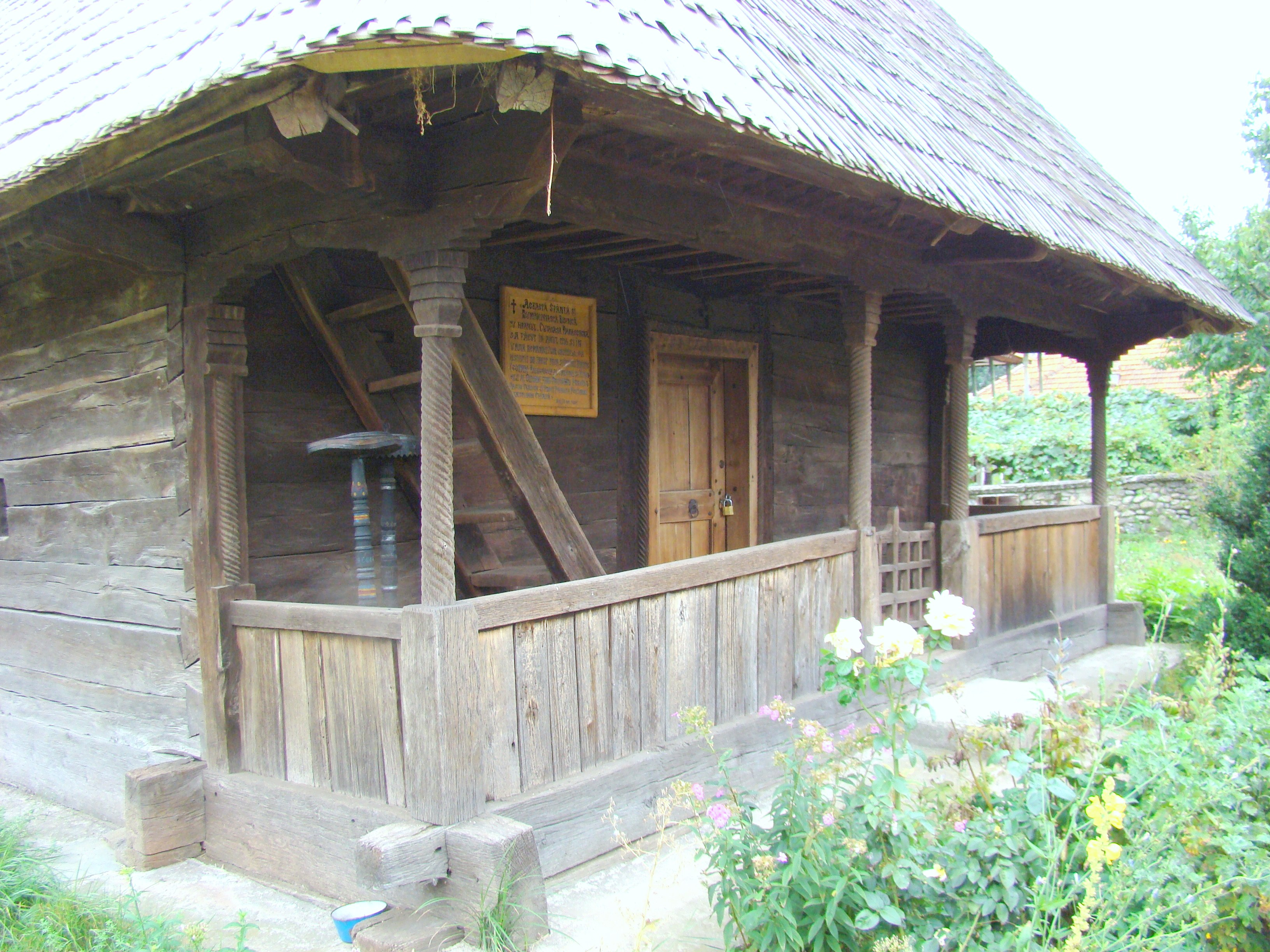 Biserica de lemn „Cuvioasa Paraschiva” din Peștișani, județul Gorj